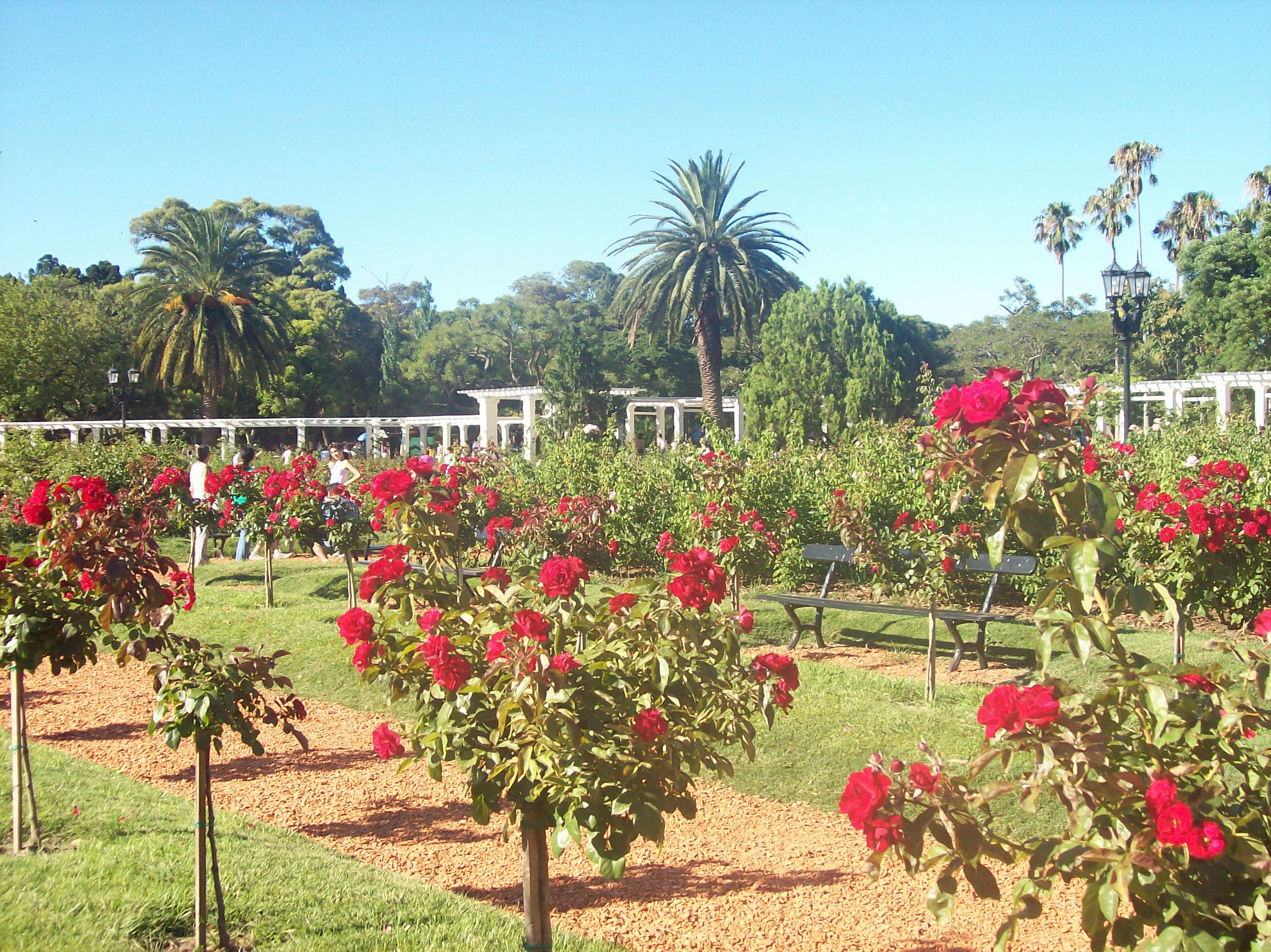 Rosas rojas en el Rosedal Palermo, Buenos Aires (Parque 3 de Febrero)